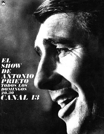 Afiche del programa televisivo "El show de Antonio Prieto" emitido durante los días domingo por Canal 13 de Buenos Aires Argentina entre 1960 y 1964